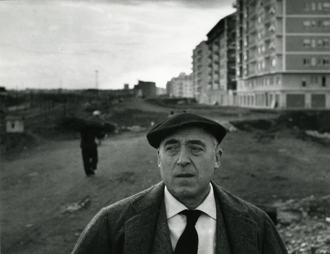 Servizio fotografico : Milano, 1975 / Paolo Monti. - Stampe: 4 : Positivo b/n, gelatina bromuro d'argento/ carta, 24x30. - ((Al verso delle stampe manoscritto: "Giorgio De Chirico, 1955", "Milano 06/ Cesare Zavattini", "da Mostra Torino", "Don Ruscelta R5000". Sul coperchio della scatola manoscritto: "Ritratti".